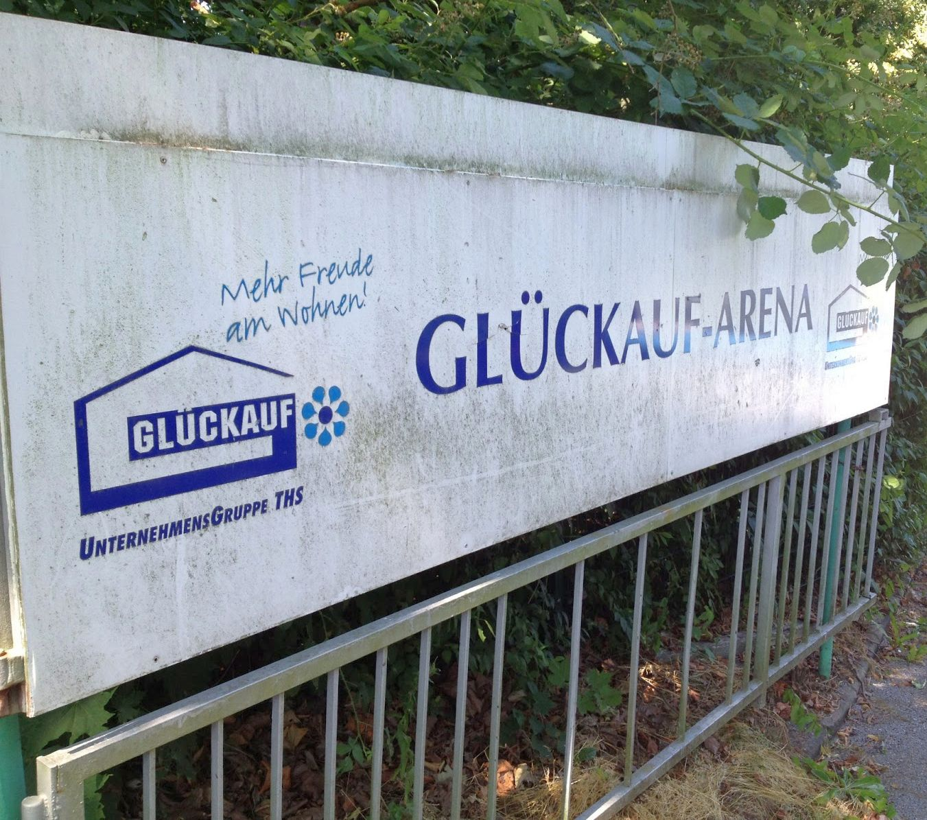 Sportsponsering Glückauf Wohnungsbaugesellschaft